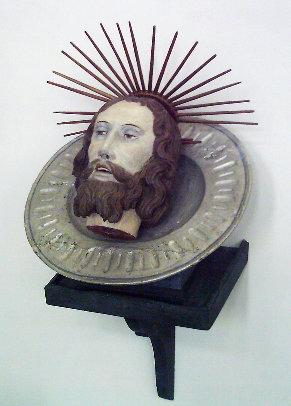 "Johannesschüssel" in Bruderschaftskirche St. Johann in Rot an der Rot, Landkreis Biberach. Als „Johannesschüssel“ werden seit dem Mittelalter verbreitete Darstellungen mit dem Haupt des Hl. Johannes d. Täufers auf einer Schüssel bezeichnet. Sie wurden besonders bei Kopfleiden vom Volk verehrt und wurden in Hospitälern oft zur Schmerzlinderung herumgereicht.